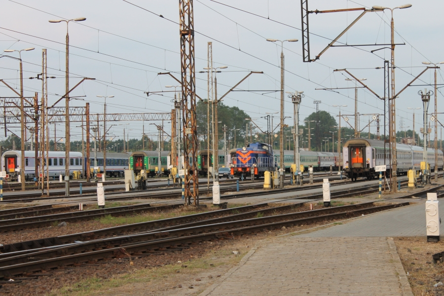 Tory odstawcze PKP Intercity na terenie stacji postojowej Warszawa Grochów.